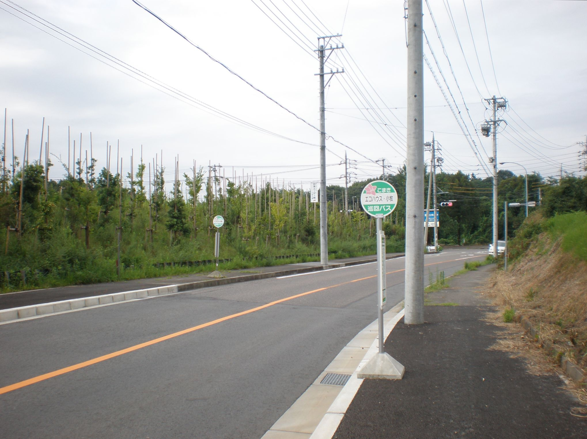 愛知県小牧市にあるこまき巡回バスのエコハウス・小牧停留所